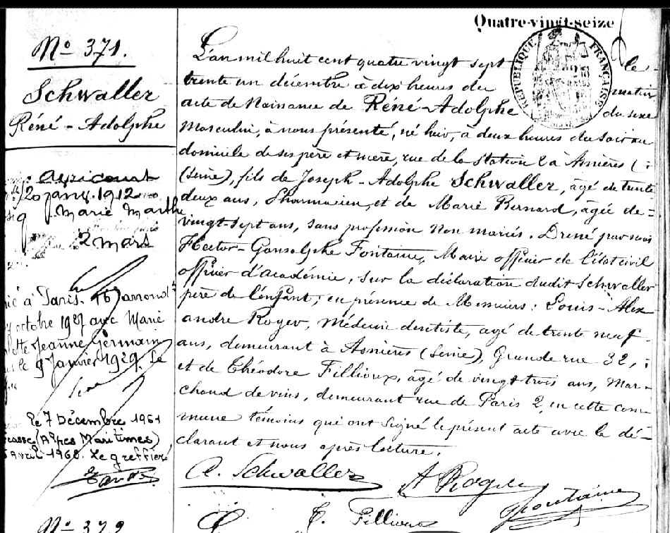 Acte de naissance de René Albert Schwaller dit de Lubicz né le 30 décembre né à 14:00 le 30 décembre 1887